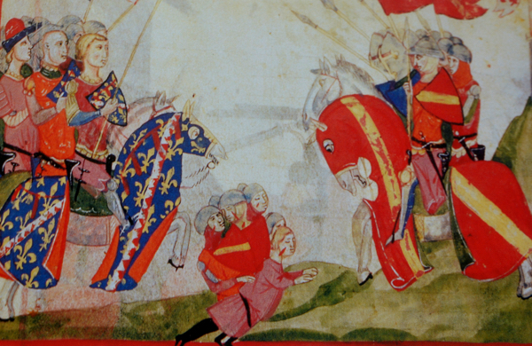 Filippo di Taranto Uguccione della Faggiola